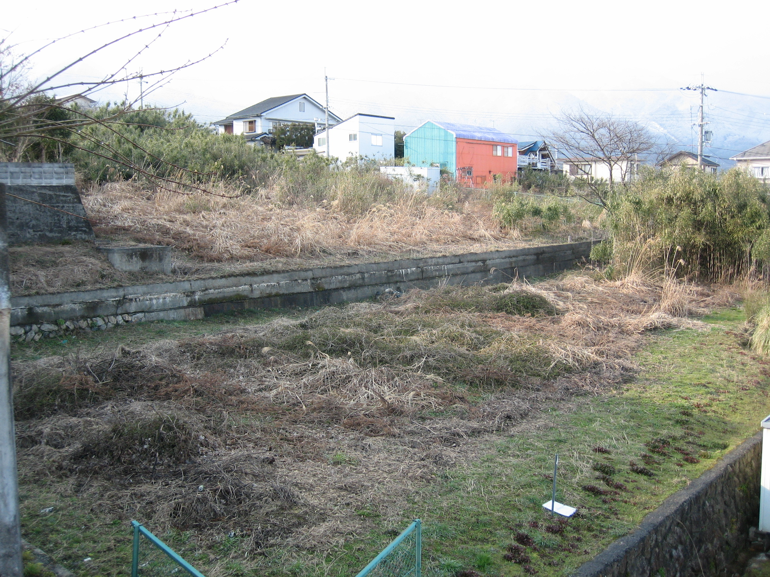 滋賀県大津市和邇北浜から住吉台地区内を撮影